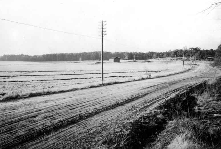 Gamla Tyresövägen före bebyggelse i Skarpnäck småstugeområde (vid nuvarande Pundpinan)